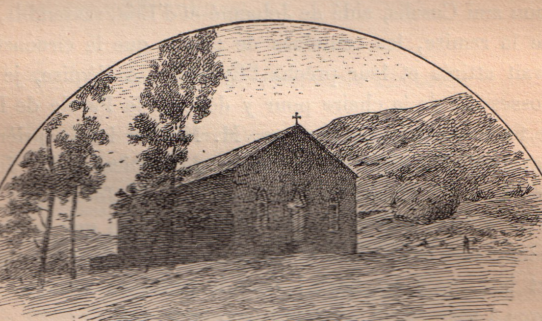 Le temple de Léribé, Basoutoland.